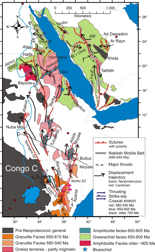 Crustal age domains in the northern East African Orogen and crustal growth phases in the Arabian–Nubian Shield. CT, Congo–Tanzania Craton; EG, Eastern Granulites.